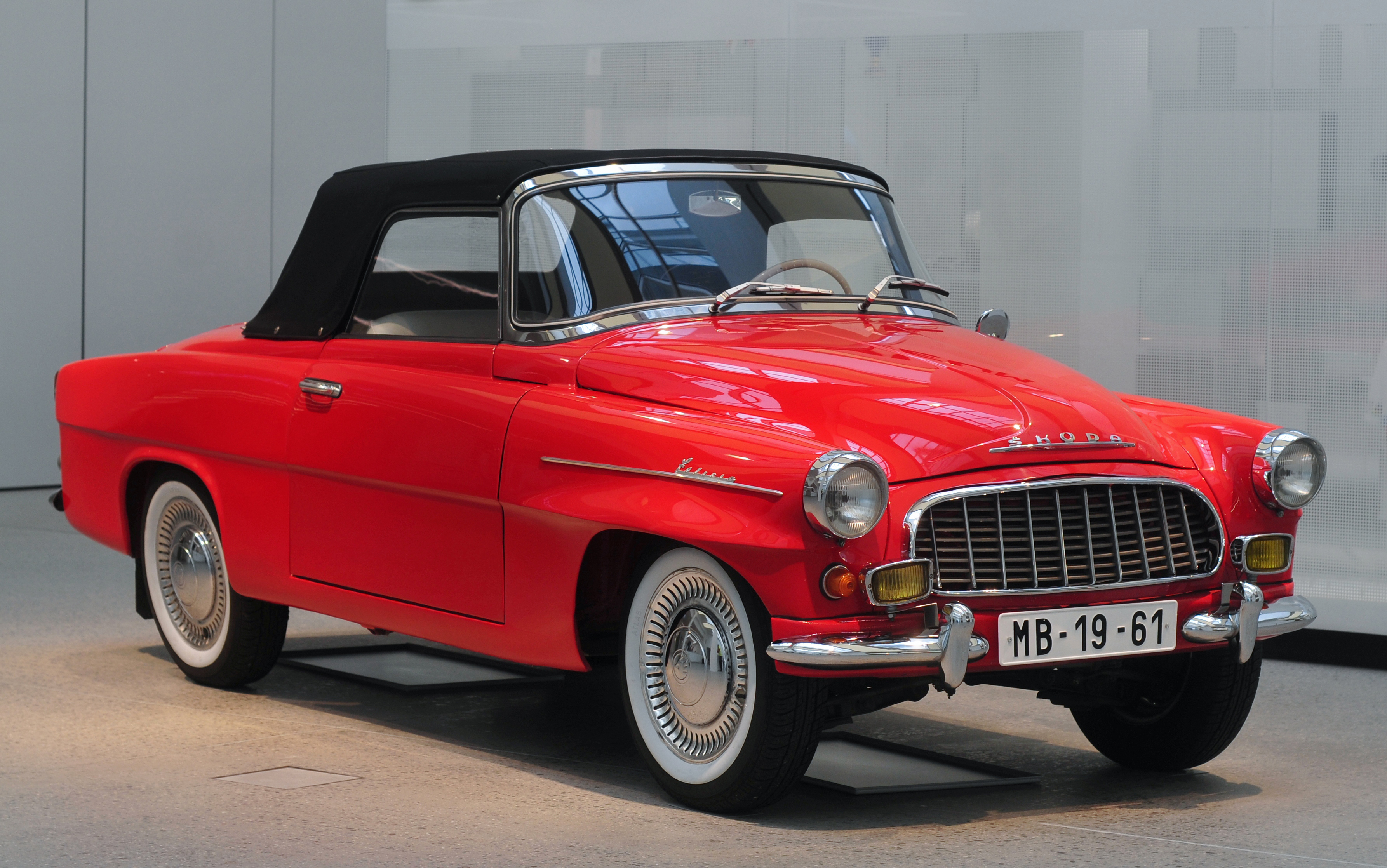 Fototermin Škoda Museum Mladá Boleslav 2013 Fototermin Škoda Muzeum 5. April 2013 in Mladá Boleslav This work is free and may be used by anyone for any purpose. If you wish to use this content, you do not need to request permission as long as you follow any licensing requirements mentioned on this page.